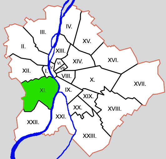 Budapest kerületei: XI. kerület